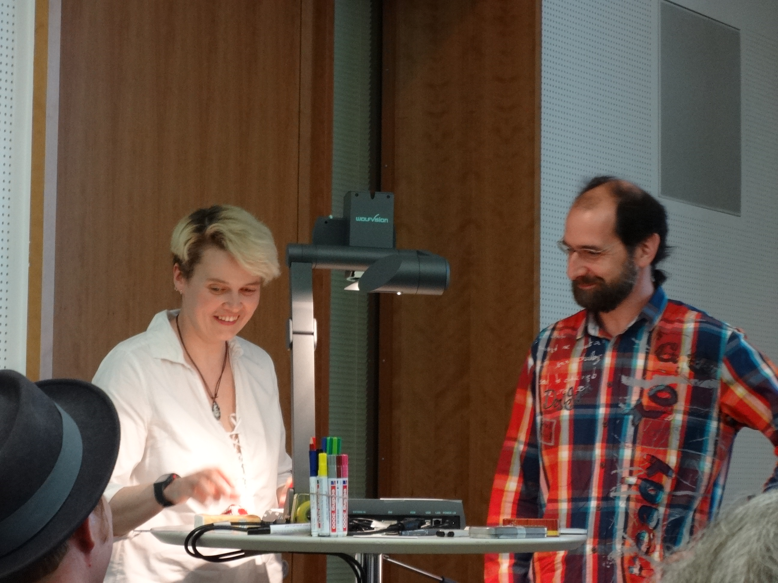 Gee Vero und Silvio Neuendorf bei einer Liveperformace anlässlich der Ausstellungseröffnung "Gee Vero. The Art of Inclusion" am 21. Mai 2014, im Kleisthaus in Berlin